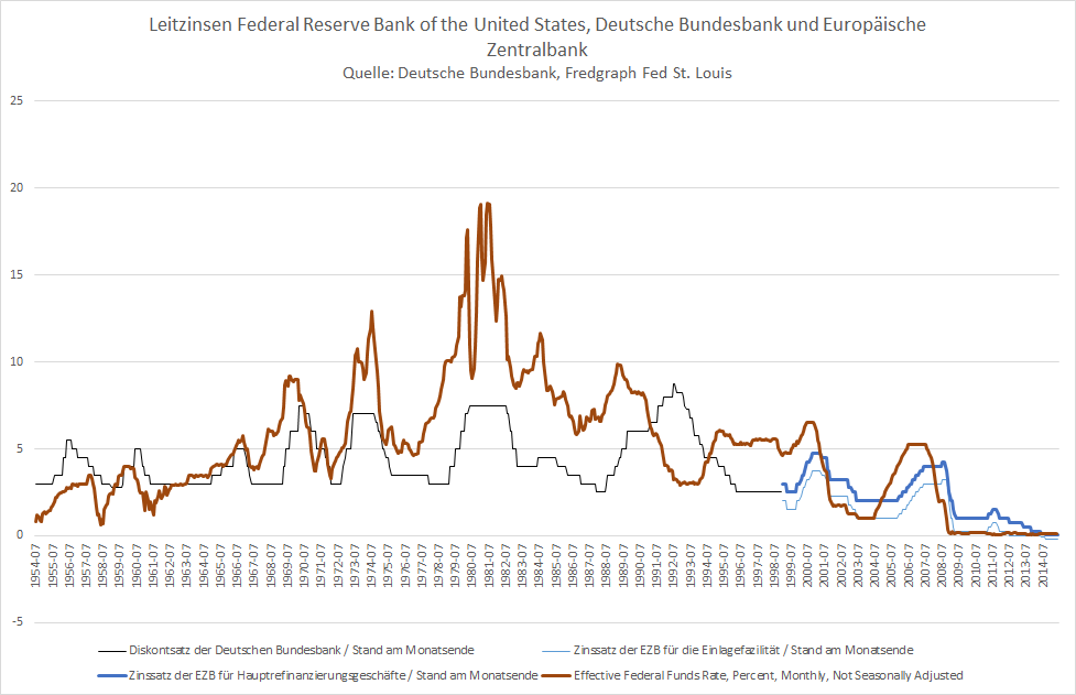 Leitzinsen in USA, BRD und Eurozone